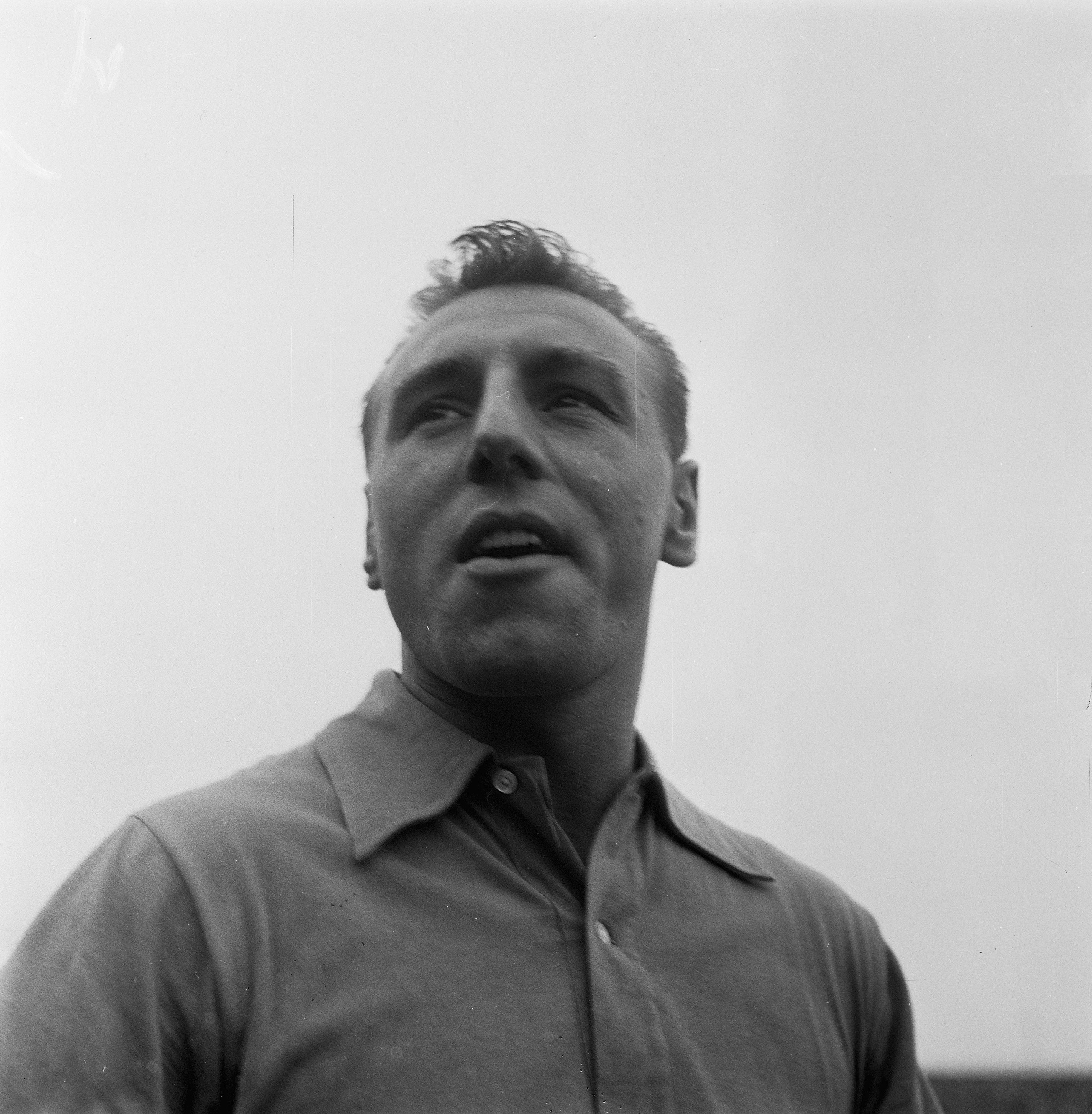 Collectie / Archief : Fotocollectie Anefo Reportage / Serie : [ onbekend ] Beschrijving : Fifa Elftal, Coppens (Belgie) Annotatie : Betreft demonstratiewedstrijd van Fifa-elftal tegen CF Barcelona in Olympisch stadion op 30 september 1953 Datum : 30 september 1953 Locatie : Amsterdam Trefwoorden : portretten, voetbal, voetballers Persoonsnaam : Coppens, Rik Fotograaf : Noske, J.D. / Anefo, [onbekend] Auteursrechthebbende : Nationaal Archief Materiaalsoort : Negatief (zwart/wit) Nummer archiefinventaris : bekijk toegang 2.24.01.03 Bestanddeelnummer : 906-0015